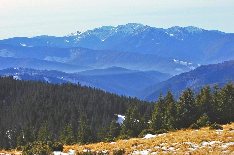 Мармароський гірський масив, Українські Карпати.